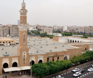 صورة لمسجد عبد الله بن العباتس